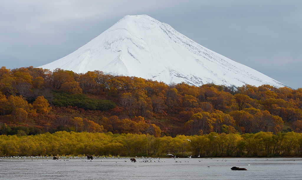 Ильинский вулкан (Ильинская сопка)